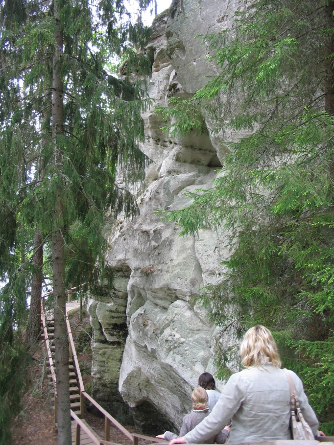 Sietiņiezis